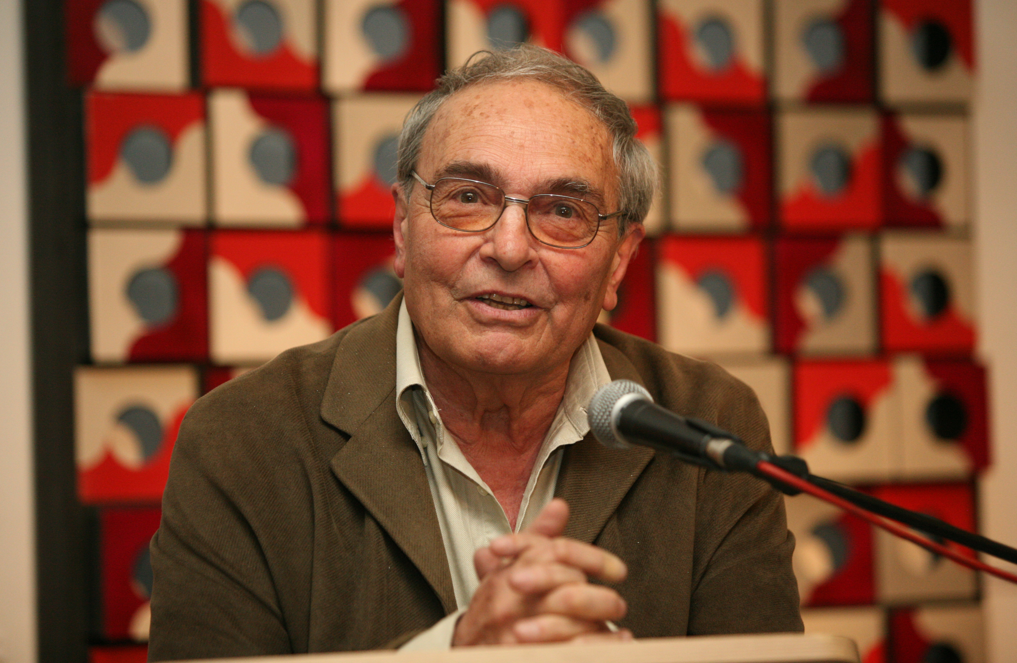 Jordi Pericot i Canaleta l'any 2007 a l'Espai d’Art Cinètic (Museu Municipal de Nàutica del Masnou).